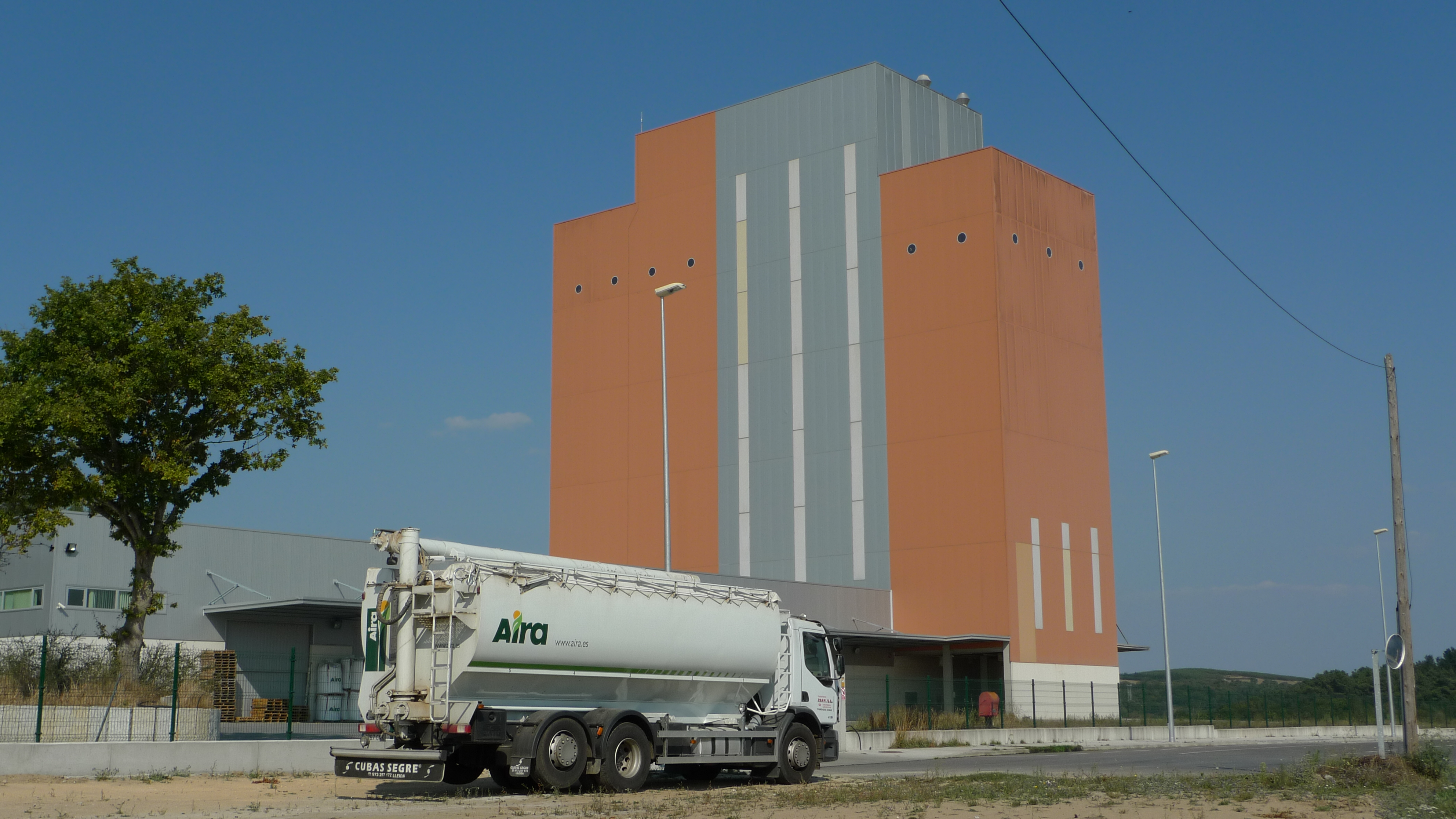 Fabrica de pensos - Taboada (Lugo)